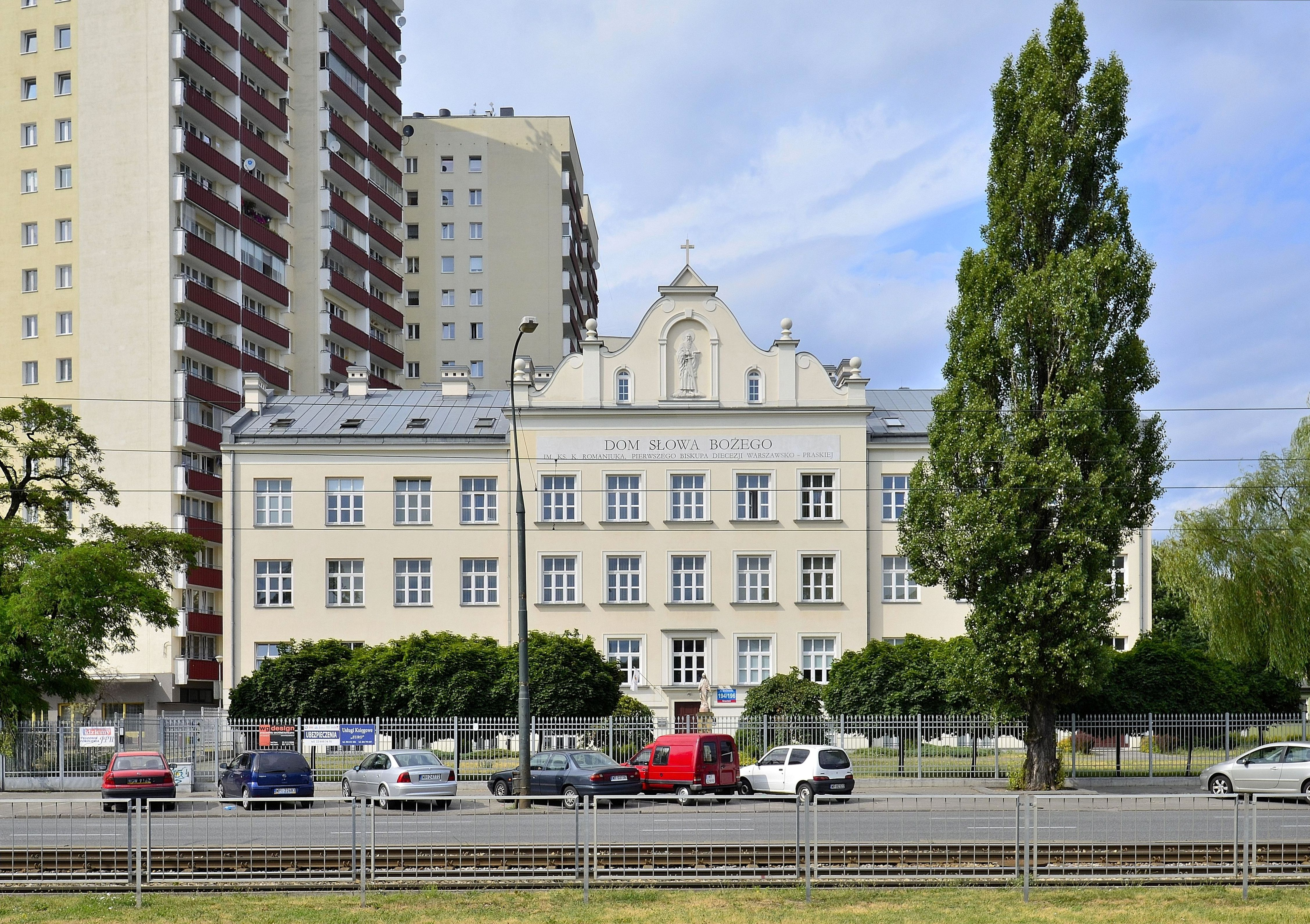 Edytujesz Gmach zakładu wychowawczego albertynów w Warszawie